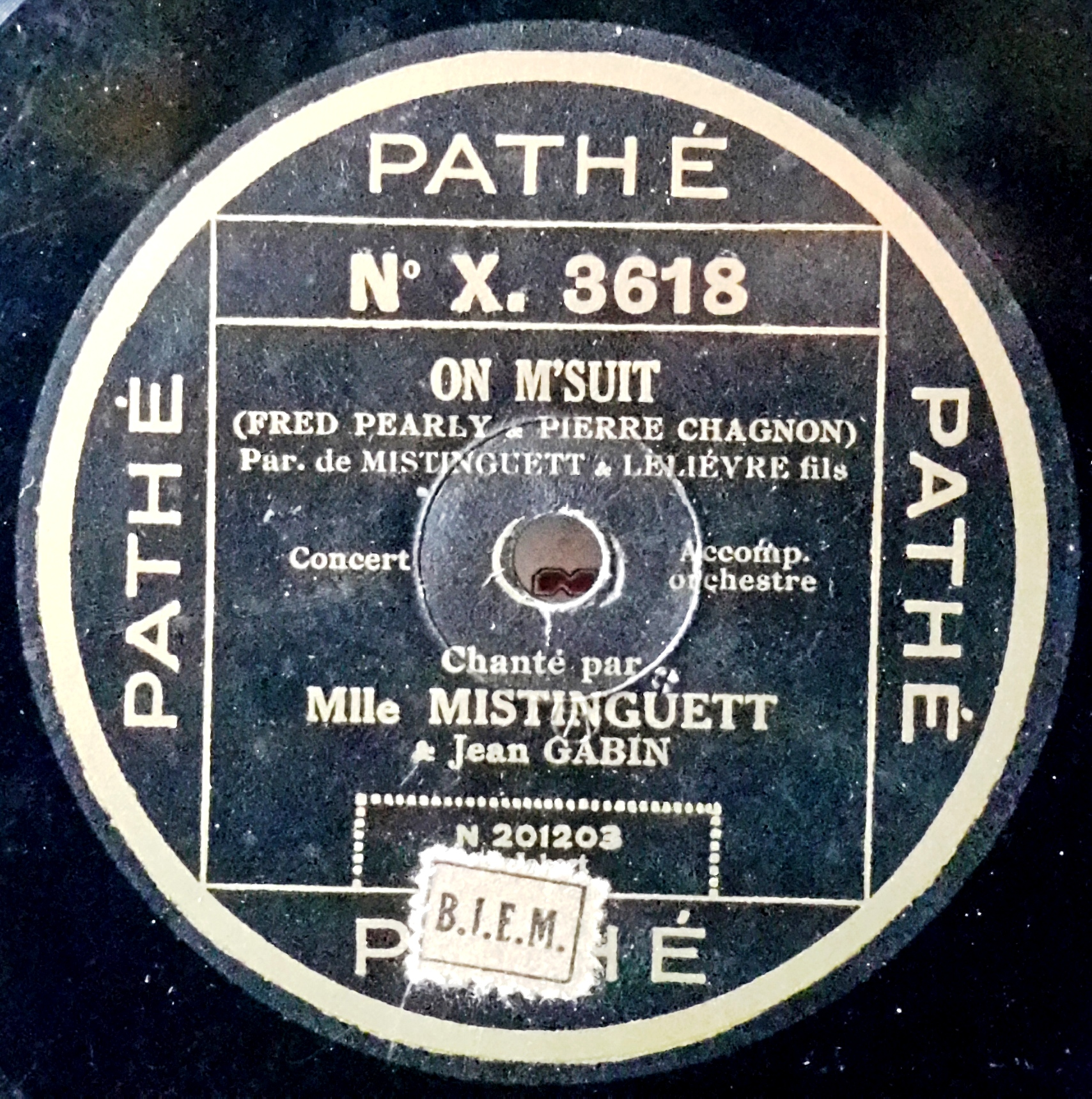 Label der frz. Pathé von etwa 1927, Aufnahme mit der Sängerin Mistinguett